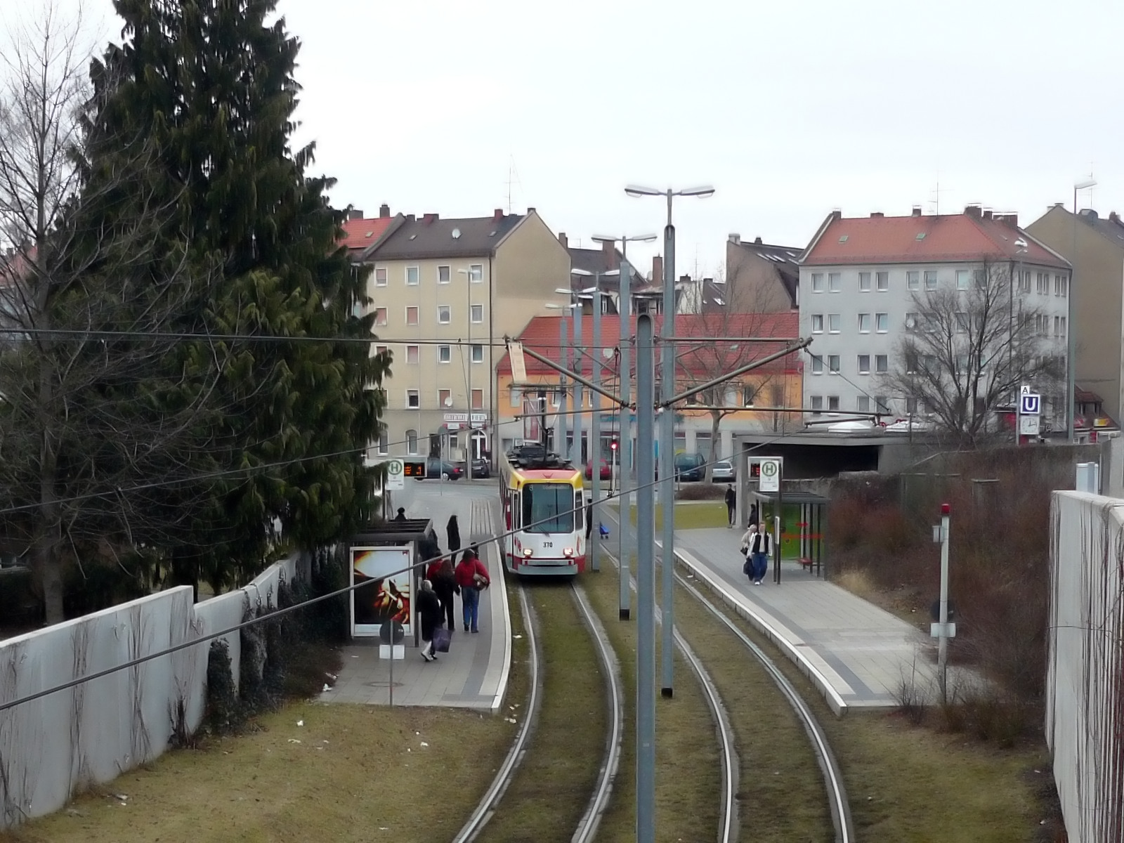 Straßenbahnhaltestelle Frankenstraße an der Kreuzung der B4R